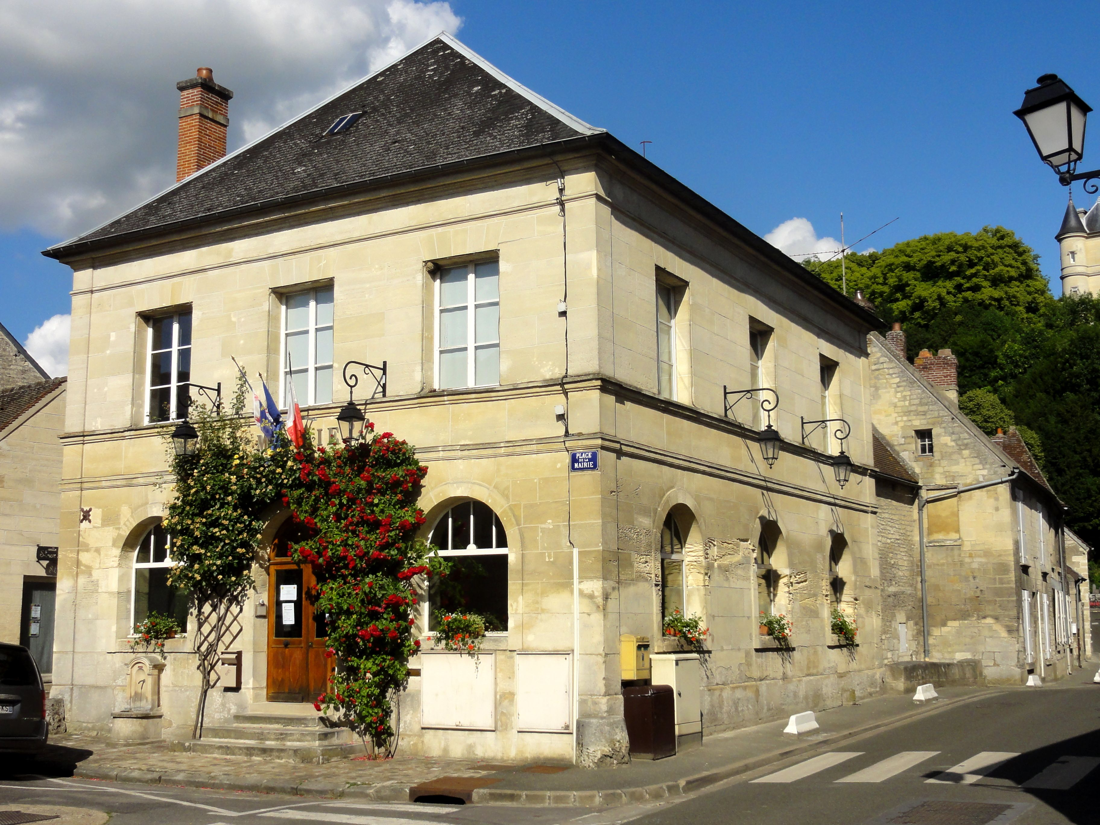 Mairie, place de la Mairie.